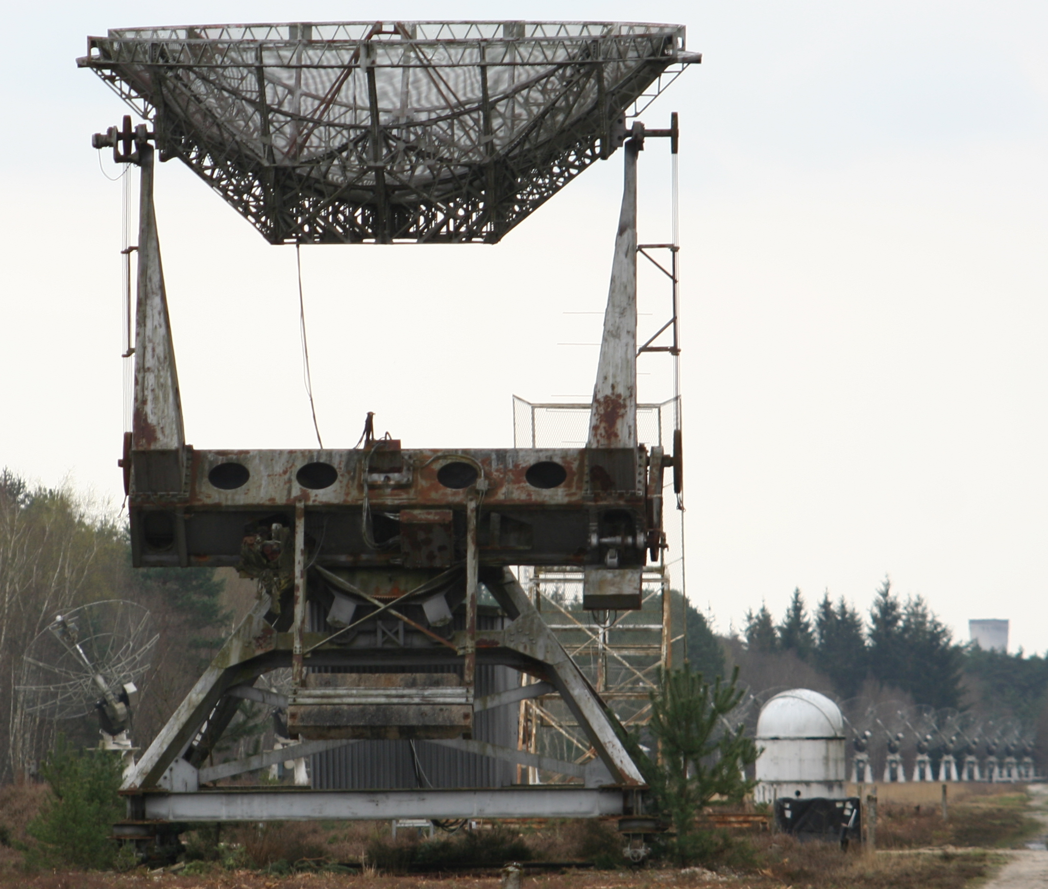 Ancien radar Würzburg, ayant servi comme radiotélescope à Nançay.